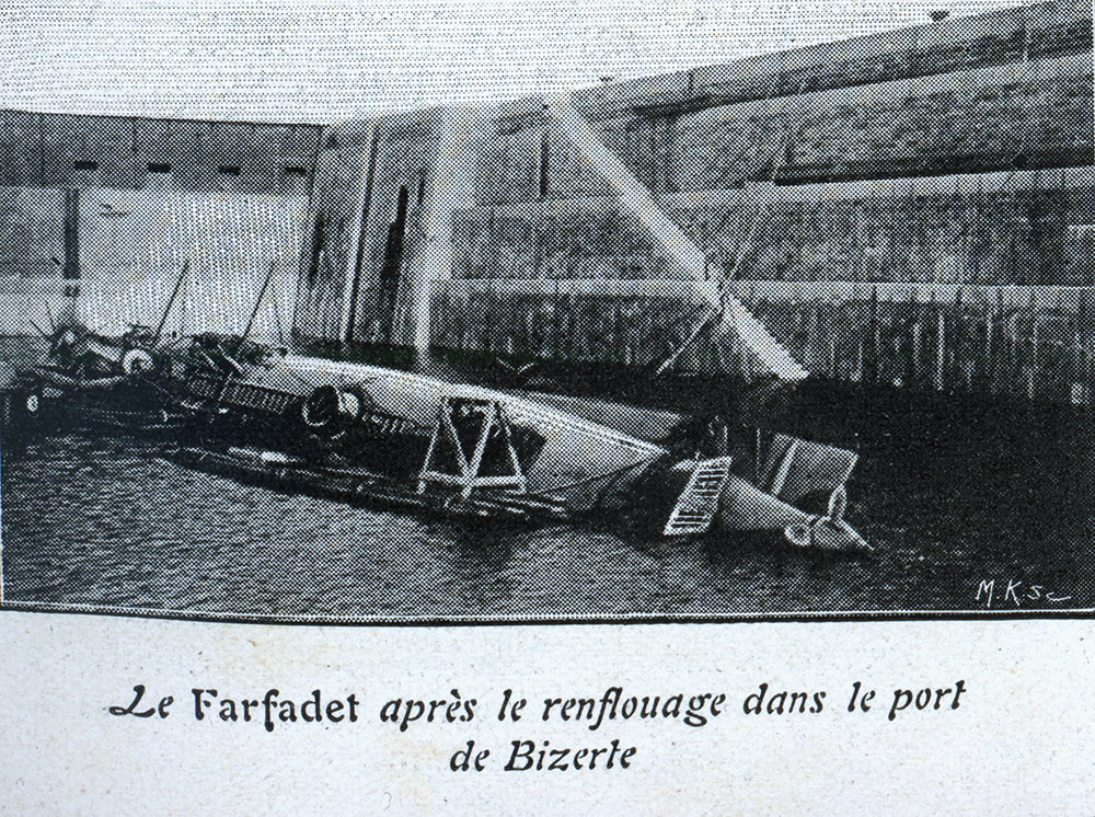 Farfadet après le renflouage dans le port de Bizerte - 1905